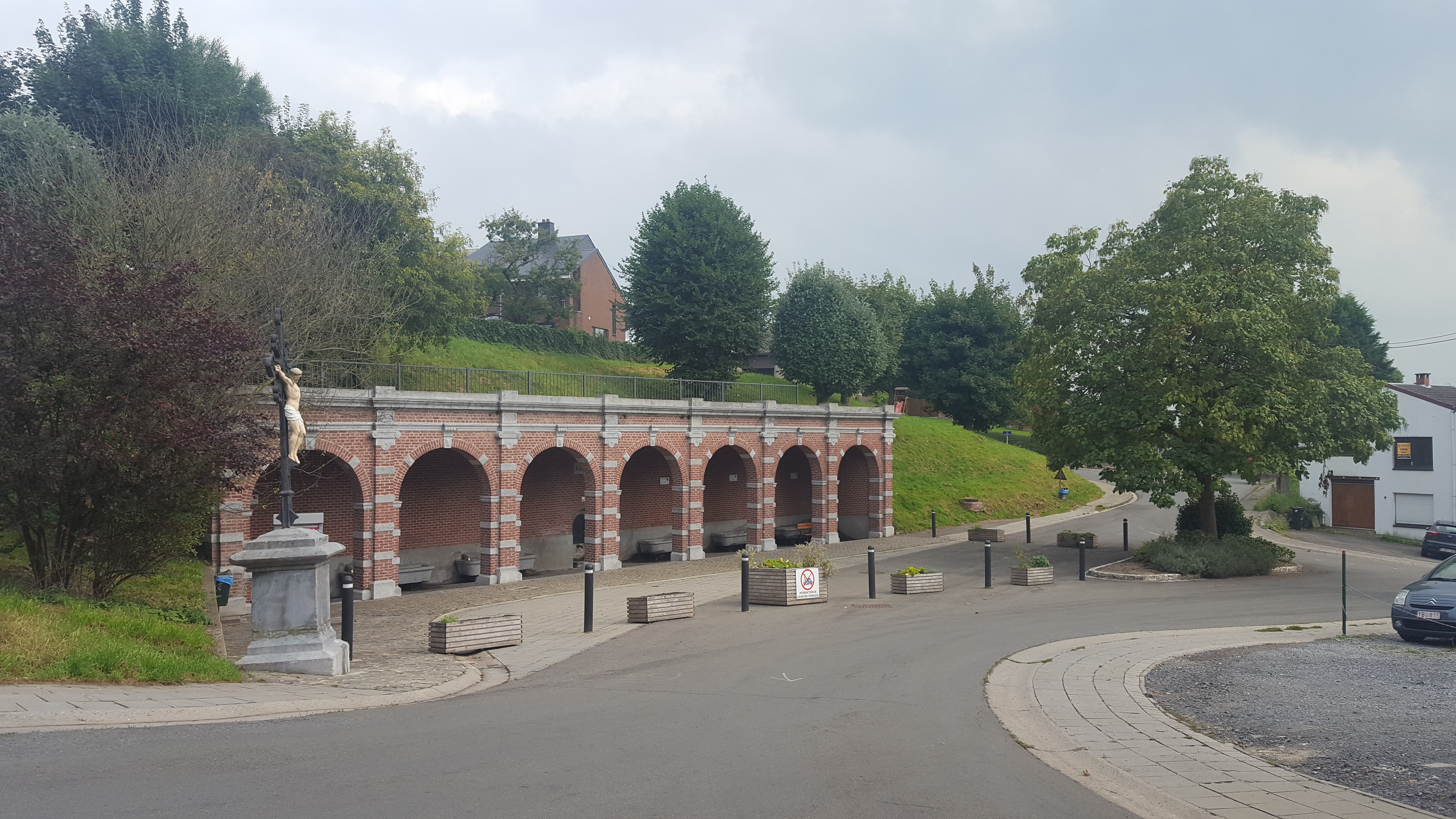 Les Six Fontaines, Herve, Belgique